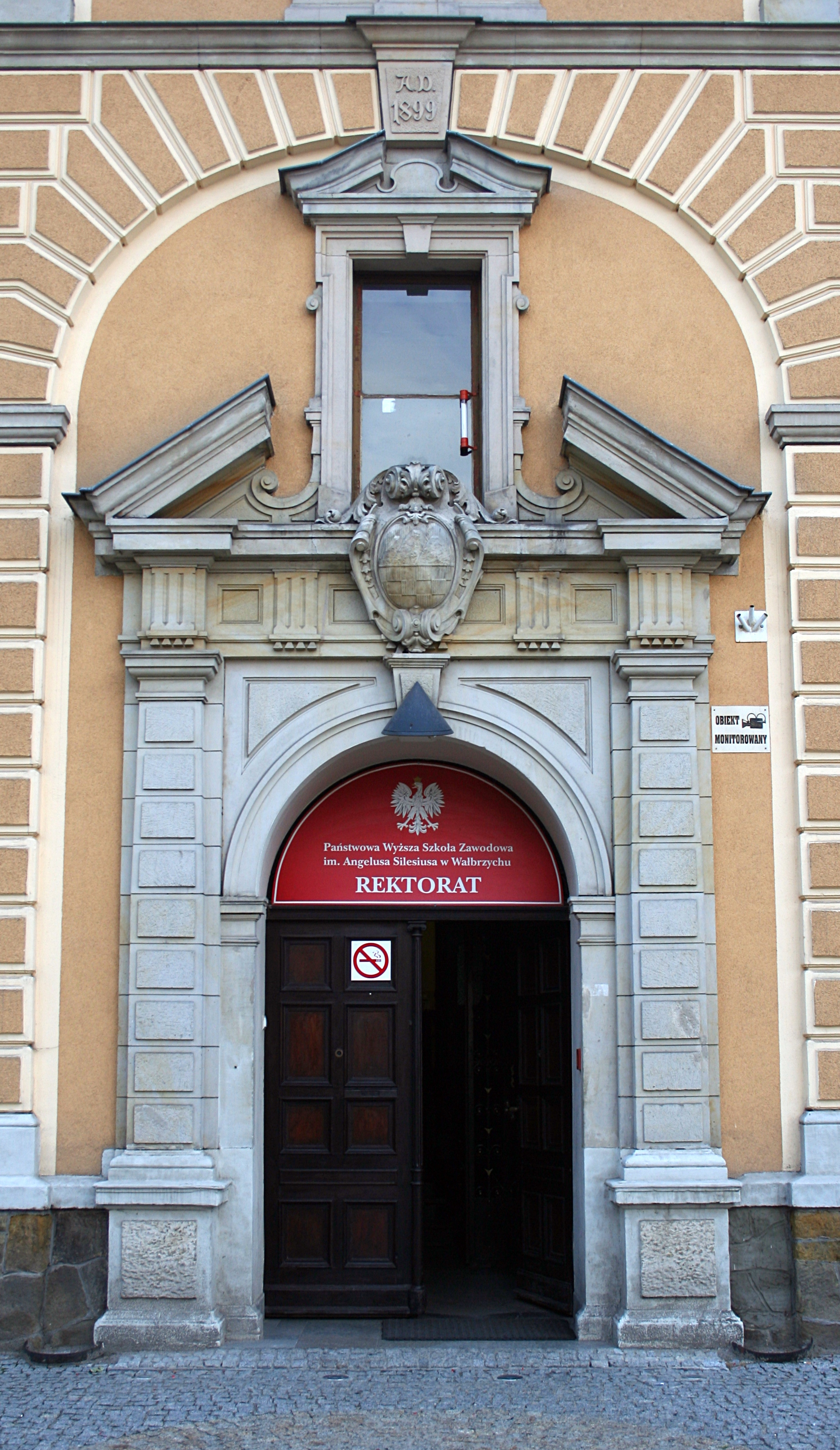 Zamek Czettritzów w Wałbrzychu, wejście do rektoratu Wyższej Szkoły Zawodowej im. Angelusa Silesiusa w Wałbrzychu